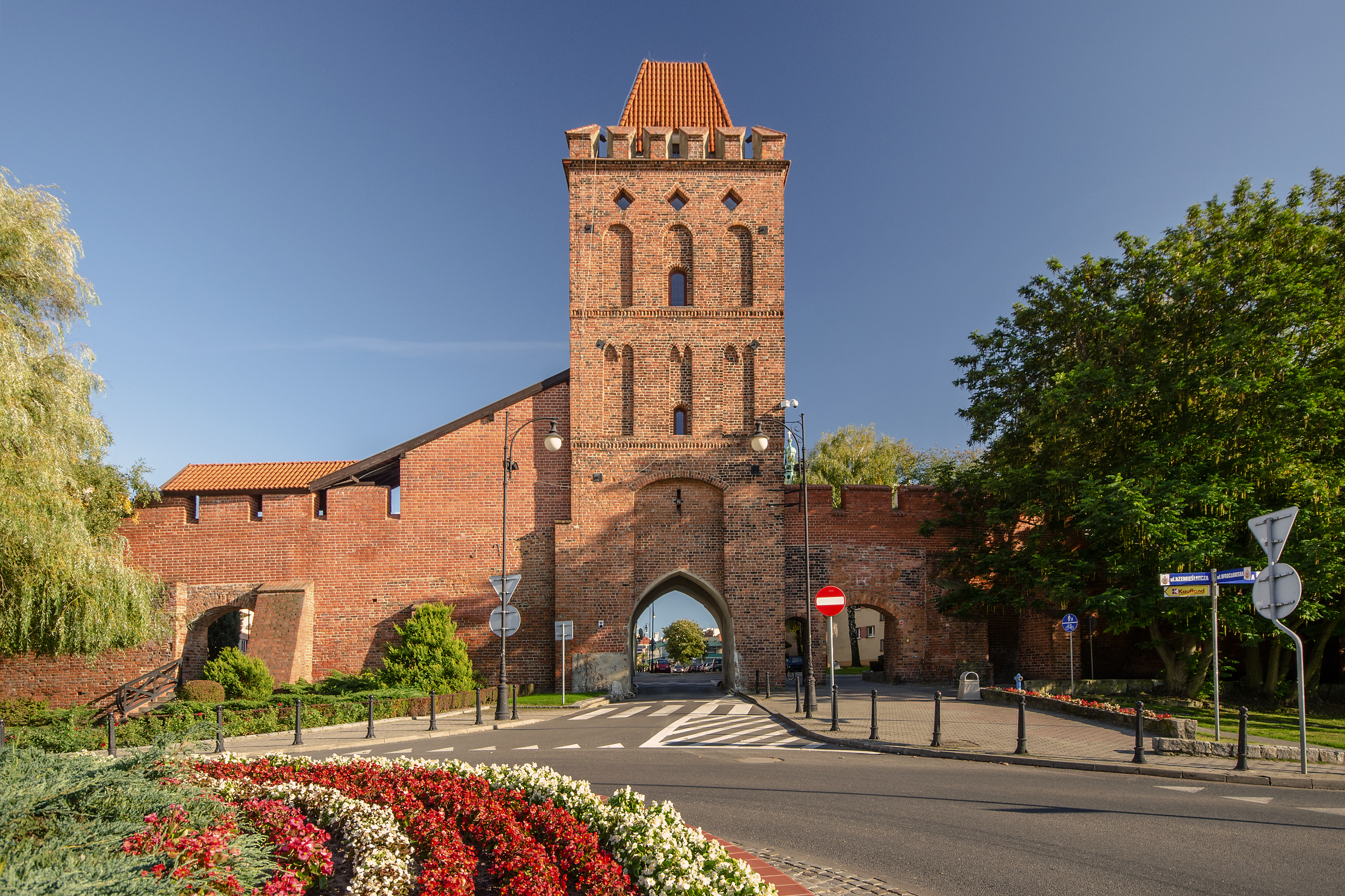 Oleśnica, Brama Wrocławska (d. Trzebnicka), 1 poł. XIV, 1 poł. XVI